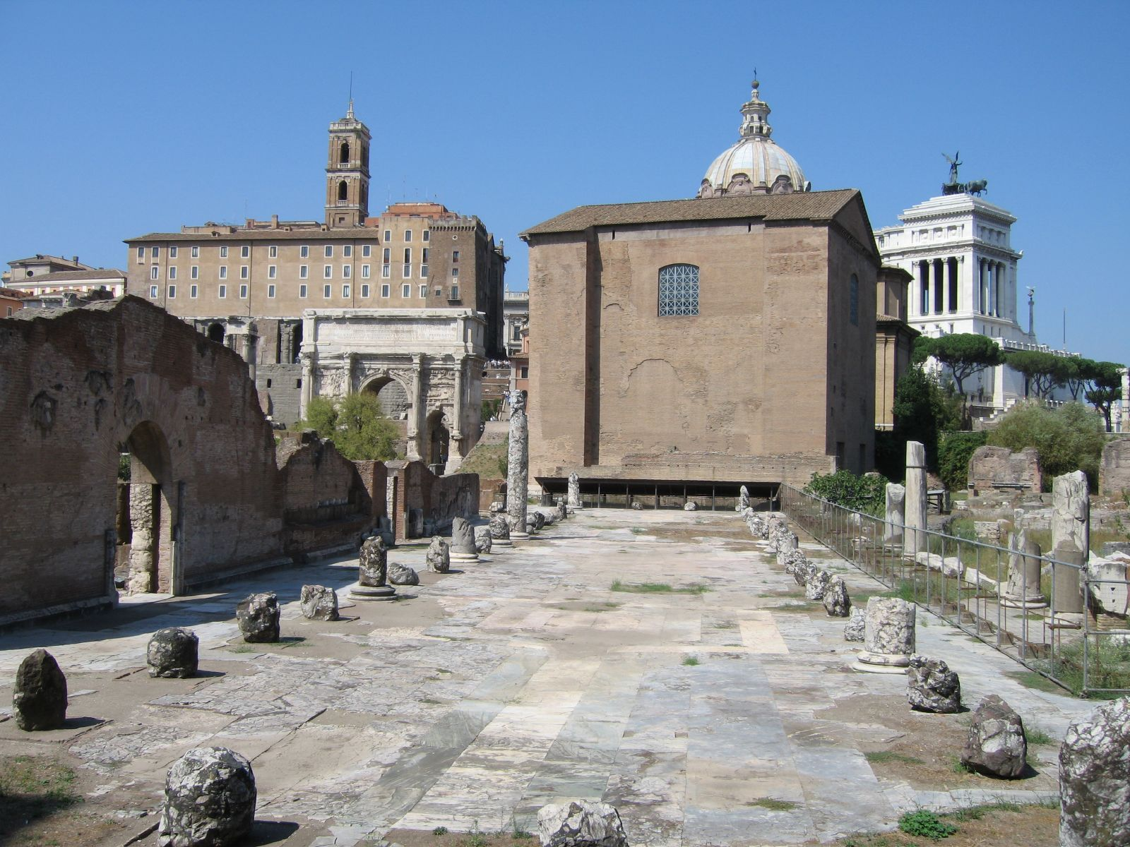 Veduta laterale della Curia Iulia, l'edificio in cui si riuniva il Senato, nei Fori imperiali di Roma, Italia. In primo piano, le rovine della Basilica Emilia.